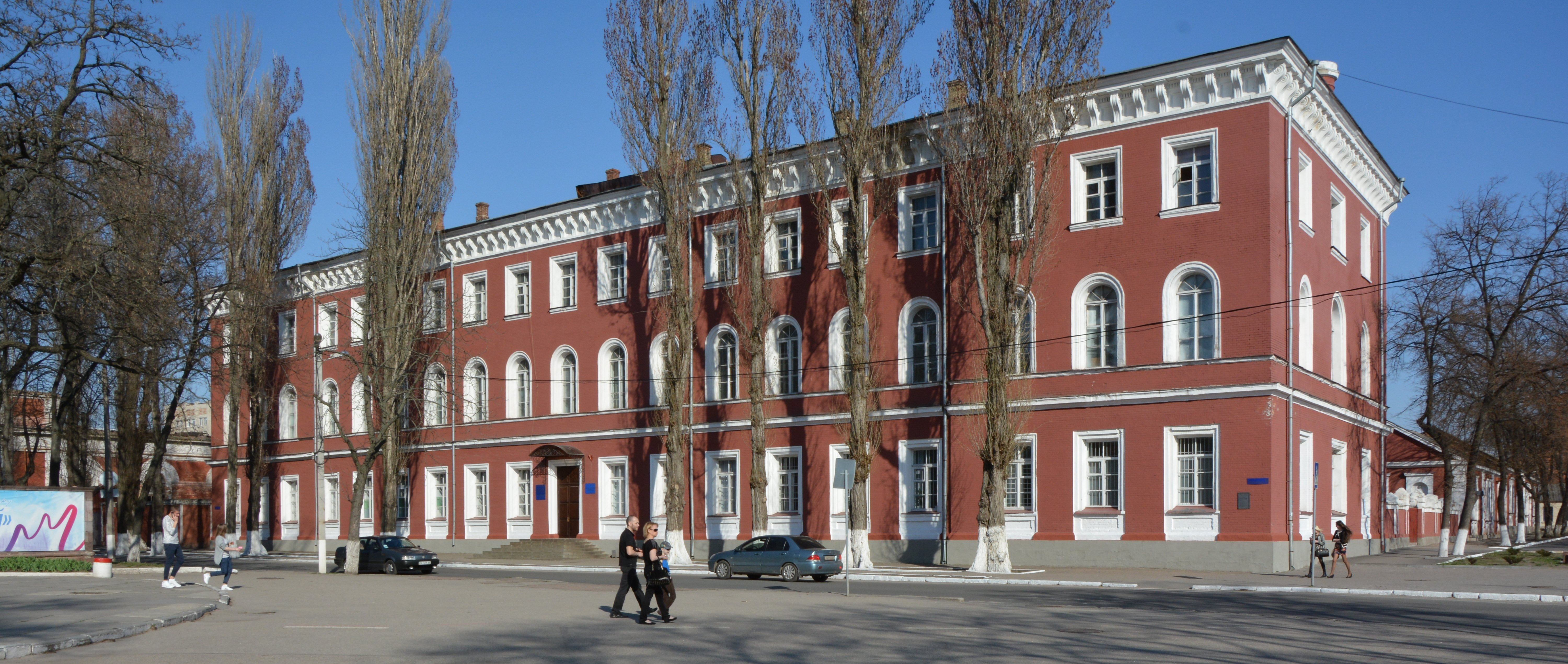 Комплекс військового юнкерського кавалерійського училища (12 споруд), Кіровоград, вул. Дворцова, вул. Кавалерійська